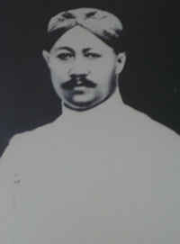 Gubernur Jawa Timur, R. M. T. Ario Soerjo